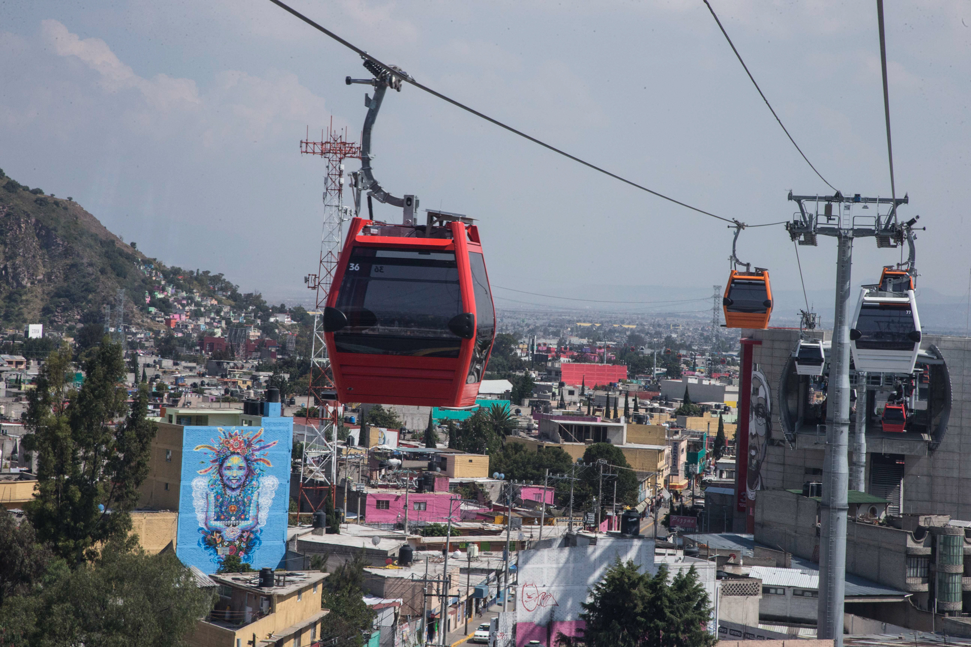 Mexicable de Ecatepec, Estado de México, en su inauguración.